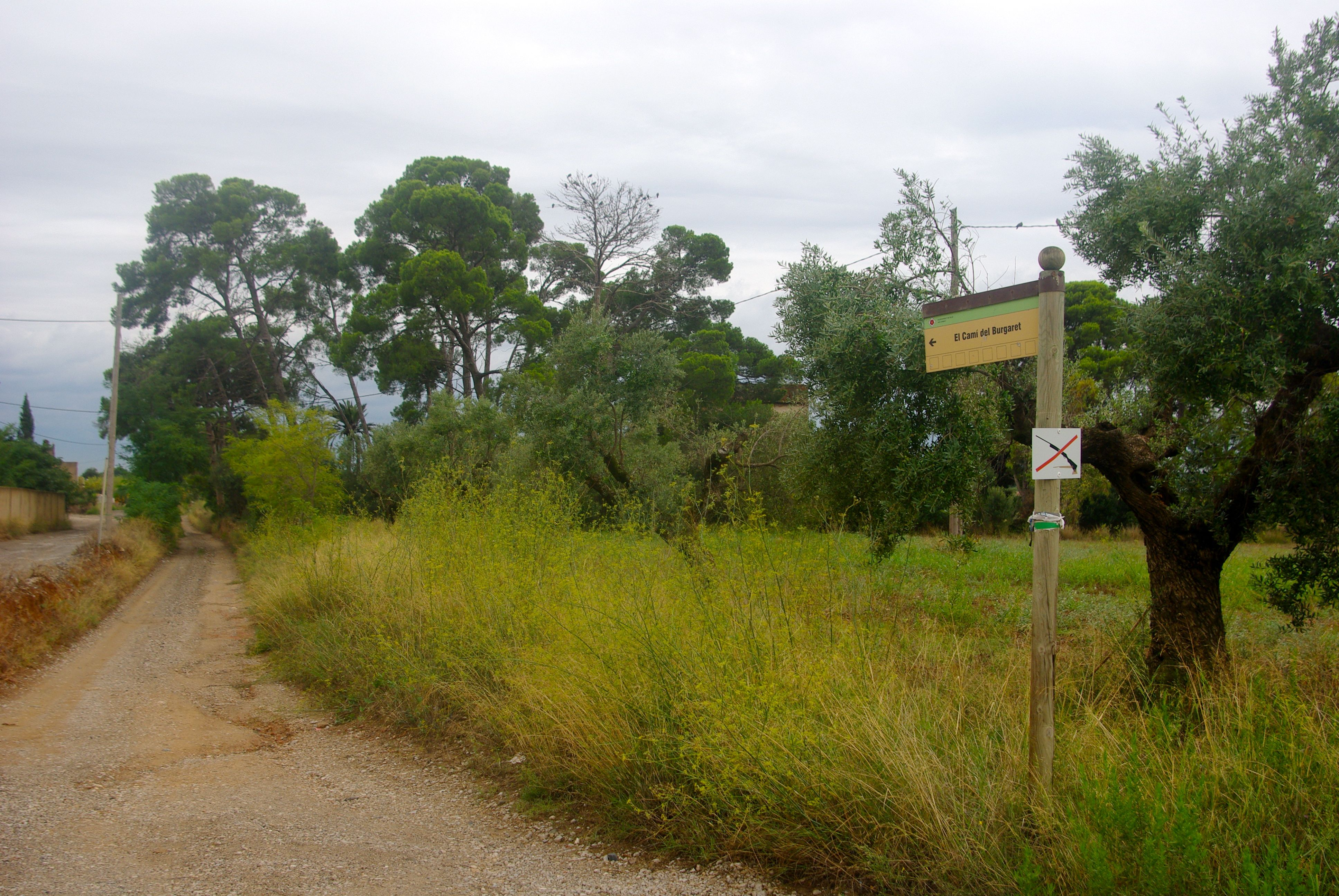 Camí del Burgaret al Burgaret, al terme de Reus